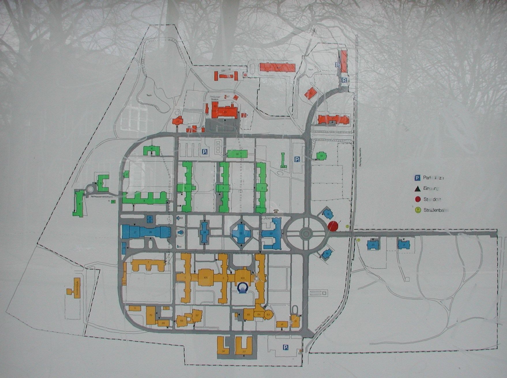 Lage- und Bebauungsplan von 2008, auf einer öffentlichen Infotafel im KEH